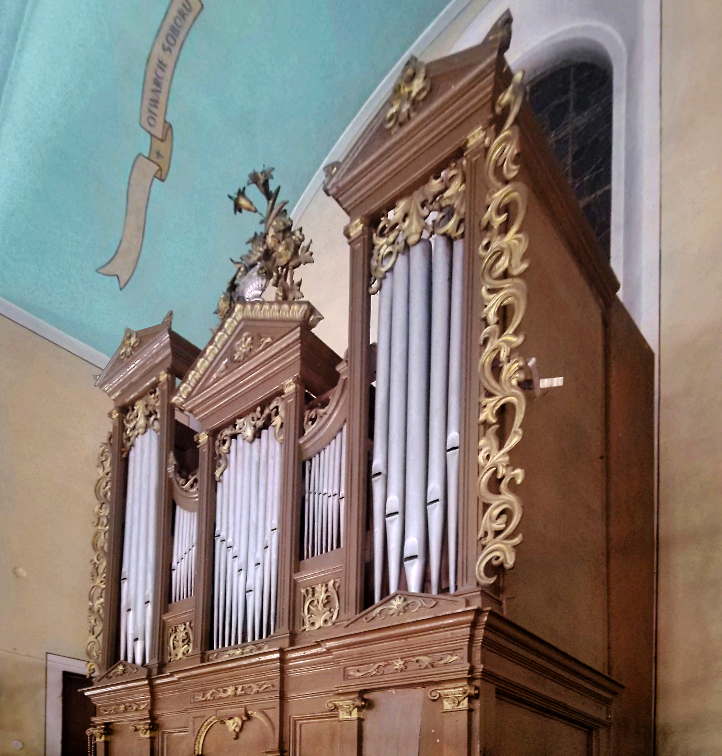 Organy piszczałkowe w kościele w Bączalu Dolnym wykonane w 1879 w krośnieńskiej pracowni Stanisława Janika przy współudziale Tomasza Falla.